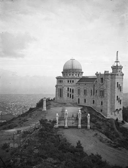 Imatge